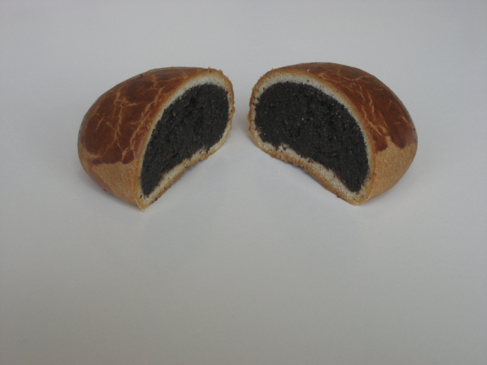 eine aufgeschnittene Mohnzelte